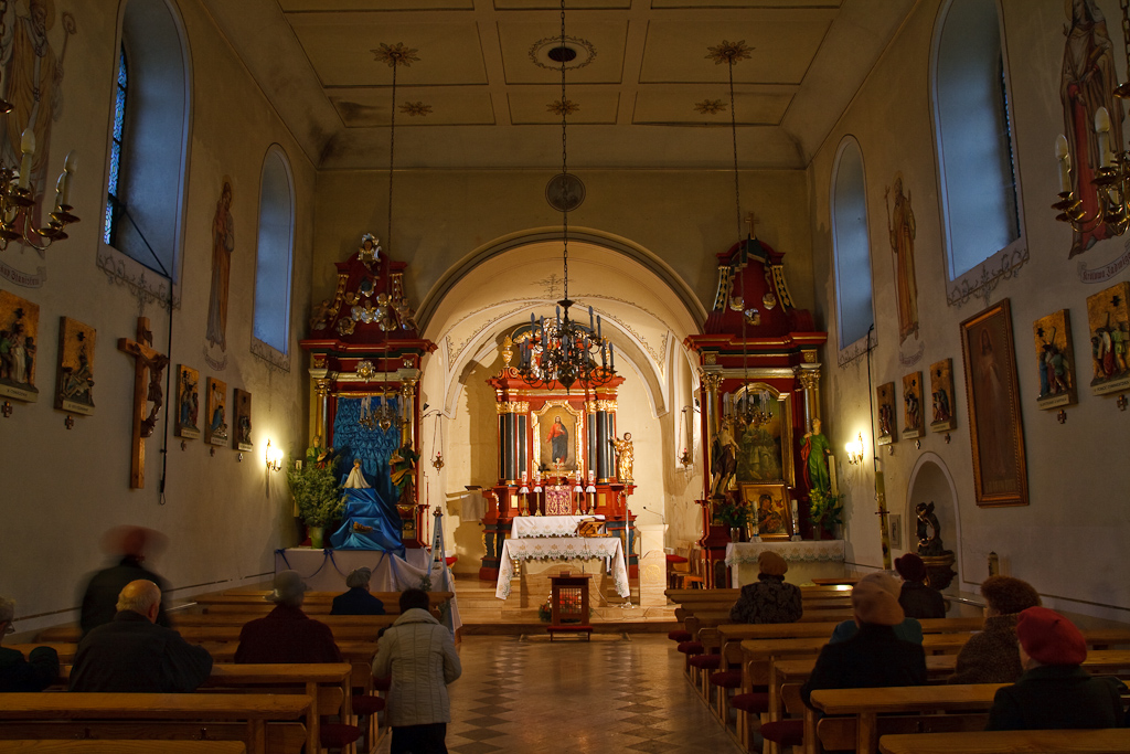 Wnętrze kościoła św. Jakuba Apostoła w Gieble.